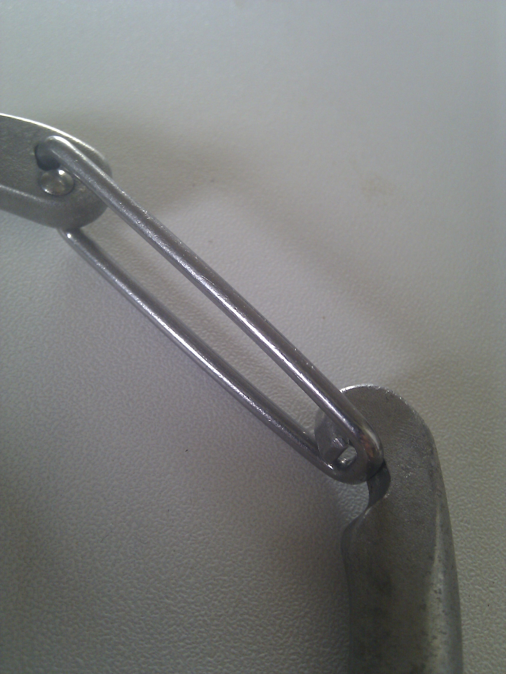 Mousqueton simple droit d'une dégaine SNAP. Particulatité : doigt d'ouverture droit de type fil. Vue détaillée, ouverture vers la droite.